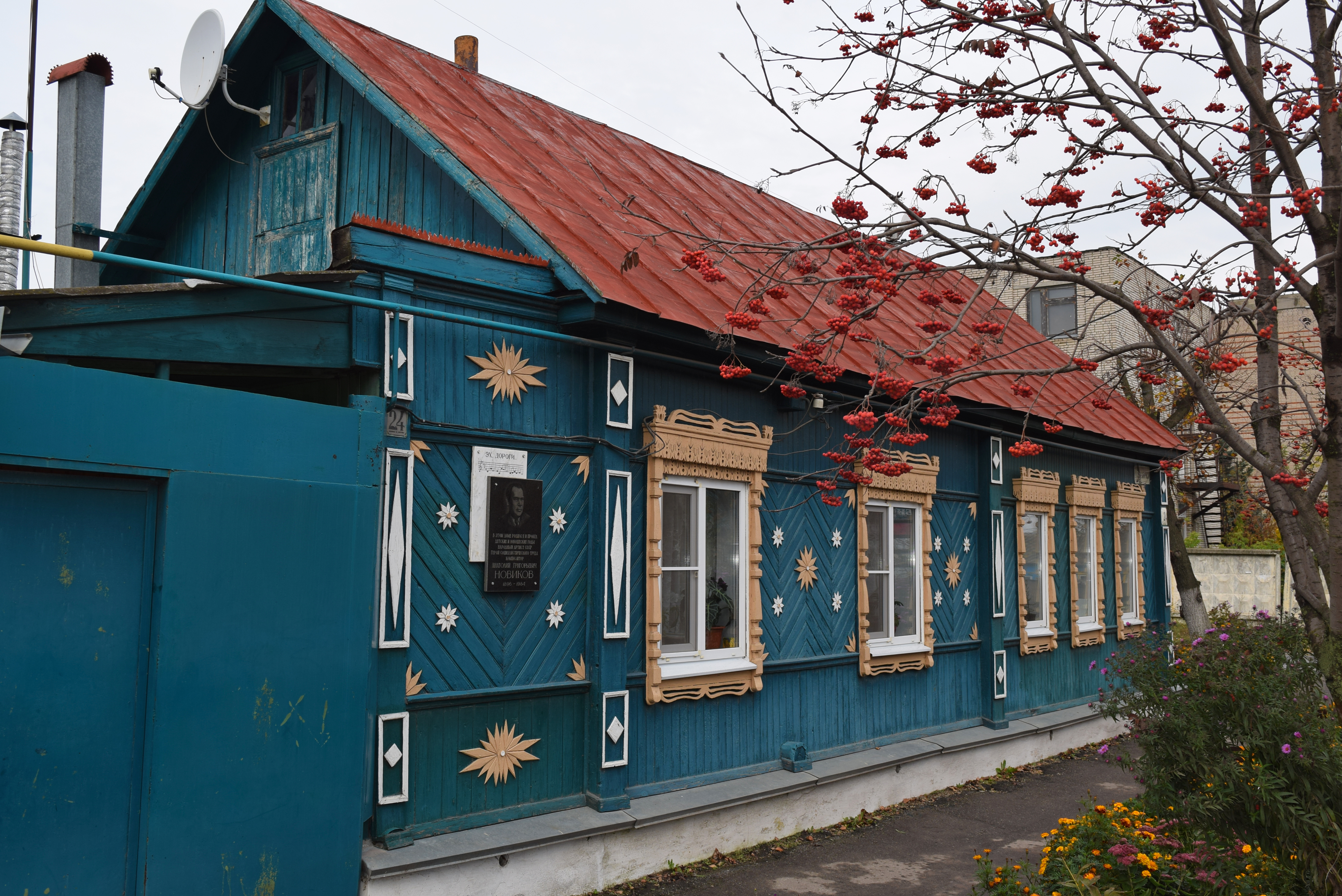 Дом композитора Анатолия Новикова (г. Скопин, ул. Карла Маркса, 24)